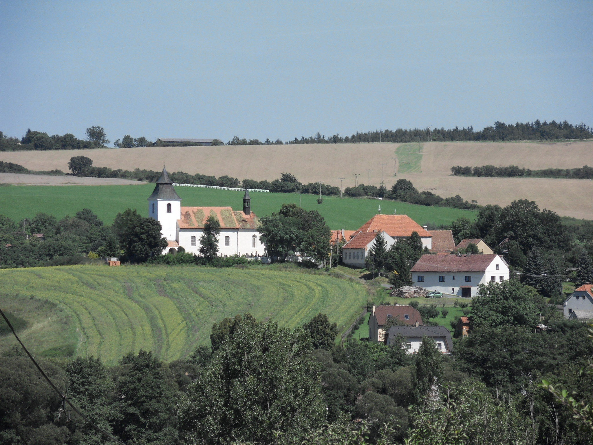 Kostel sv. Václava v obci Žďár, okr.Plzeň-jih